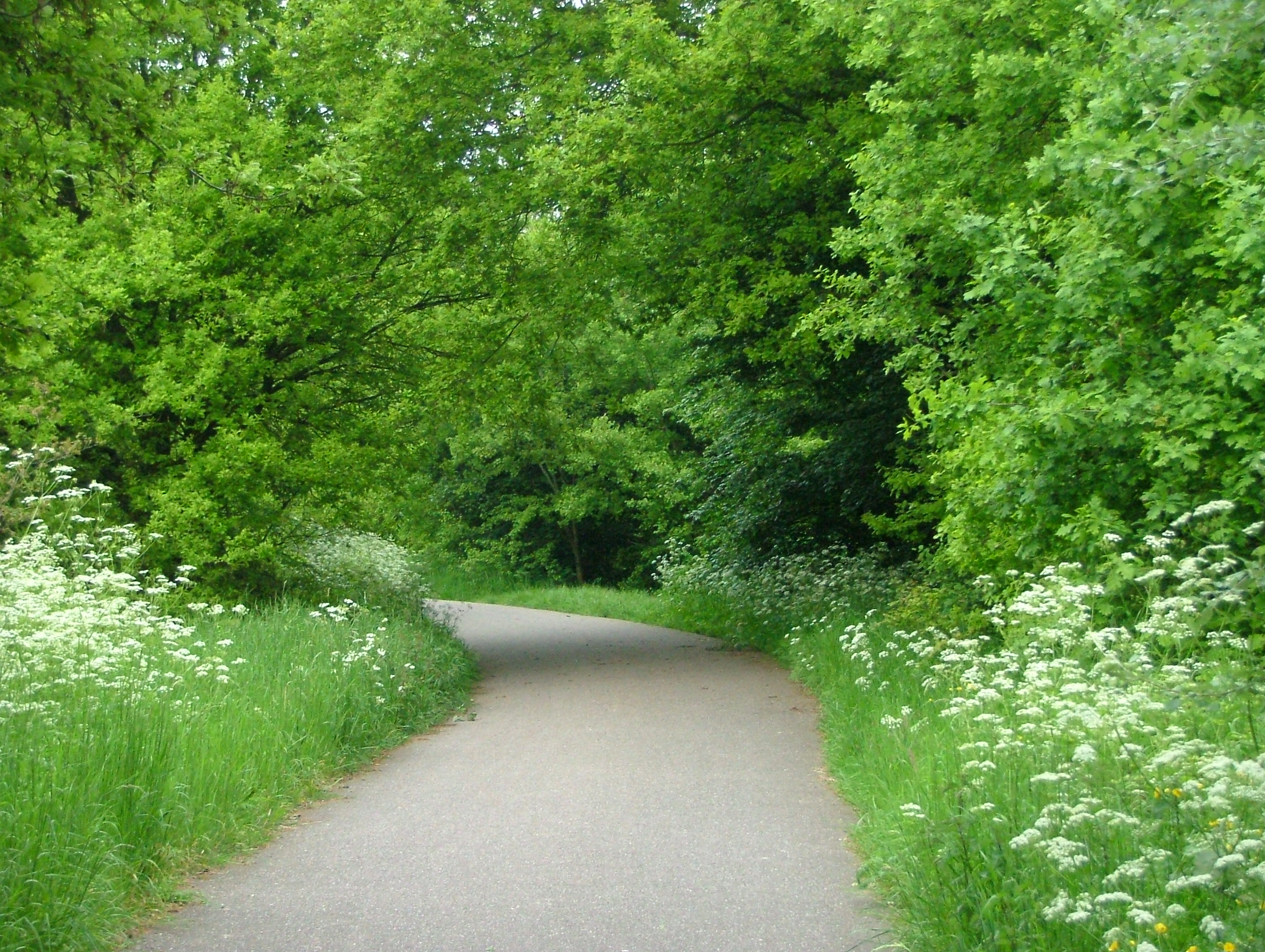 Eigen werk Geert Smulders, Rosmalen. Fietspad in de Heinis, 's-Hertogenbosch